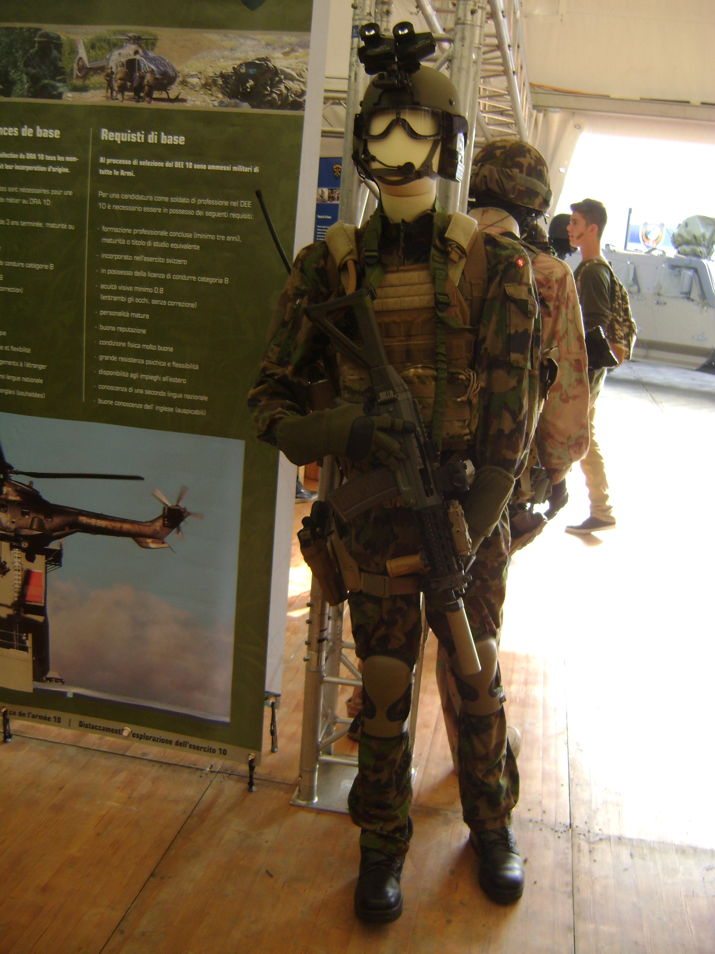 KSK Ausrüstung